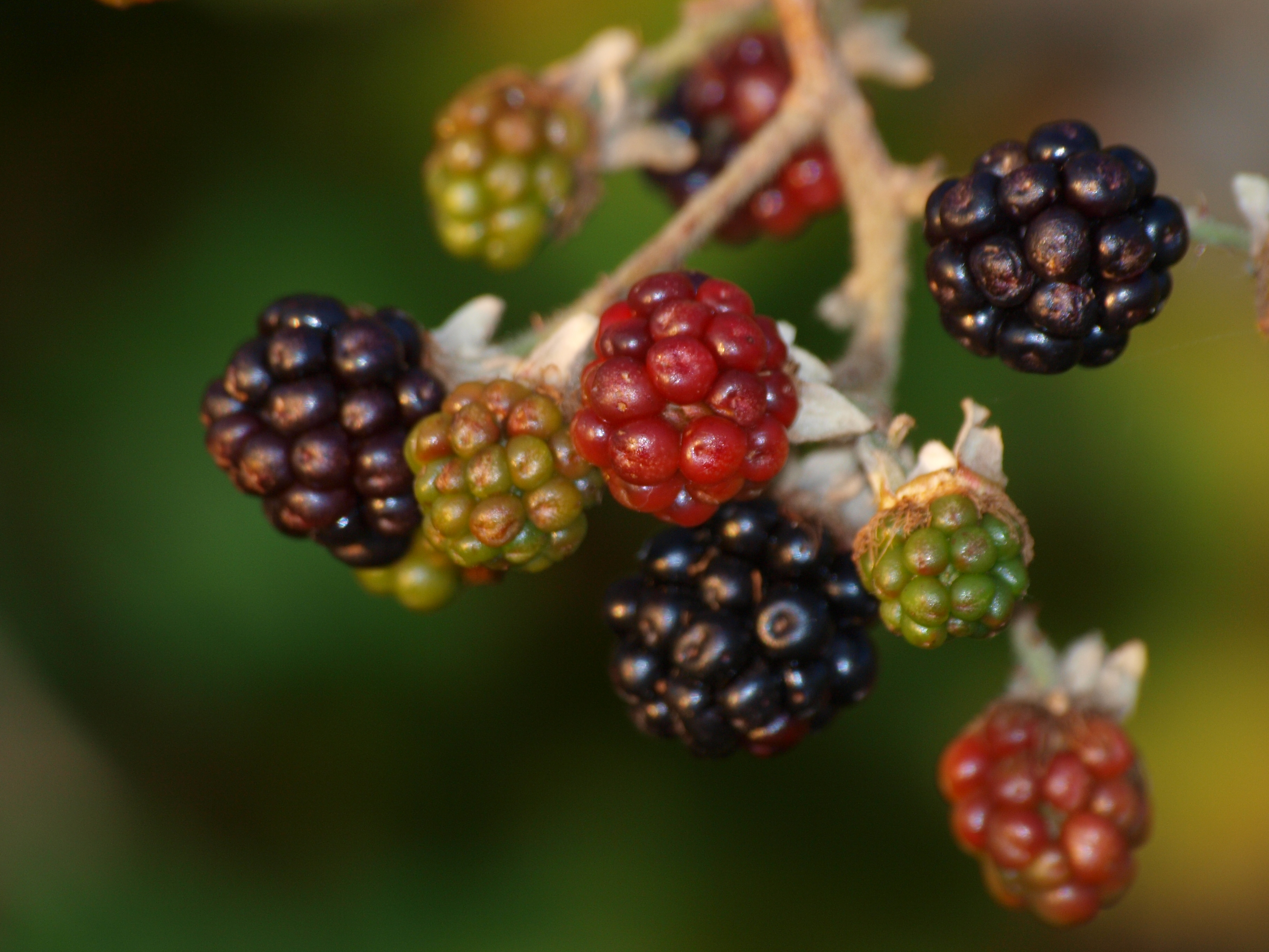 Rubus laciniatus